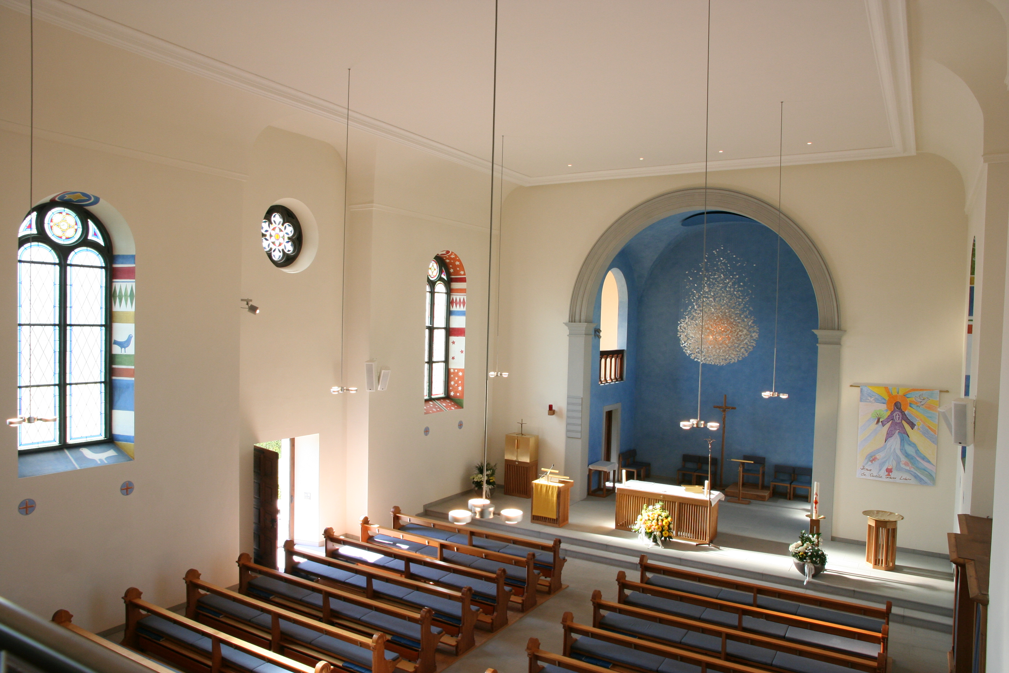 Römisch-katholische Pfarrkirche St. Pirminius Pfungen